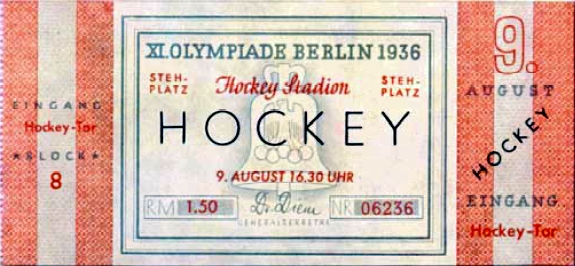 Eintrittskarte für Hockey bei den Olympischen Sommerspielen 1936